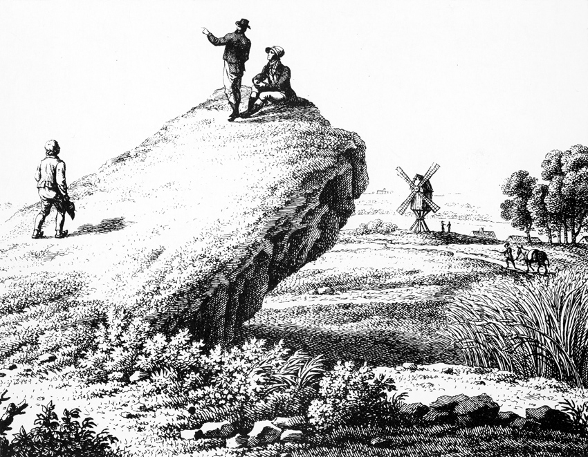 "Pierre levée près de Tirlemont"